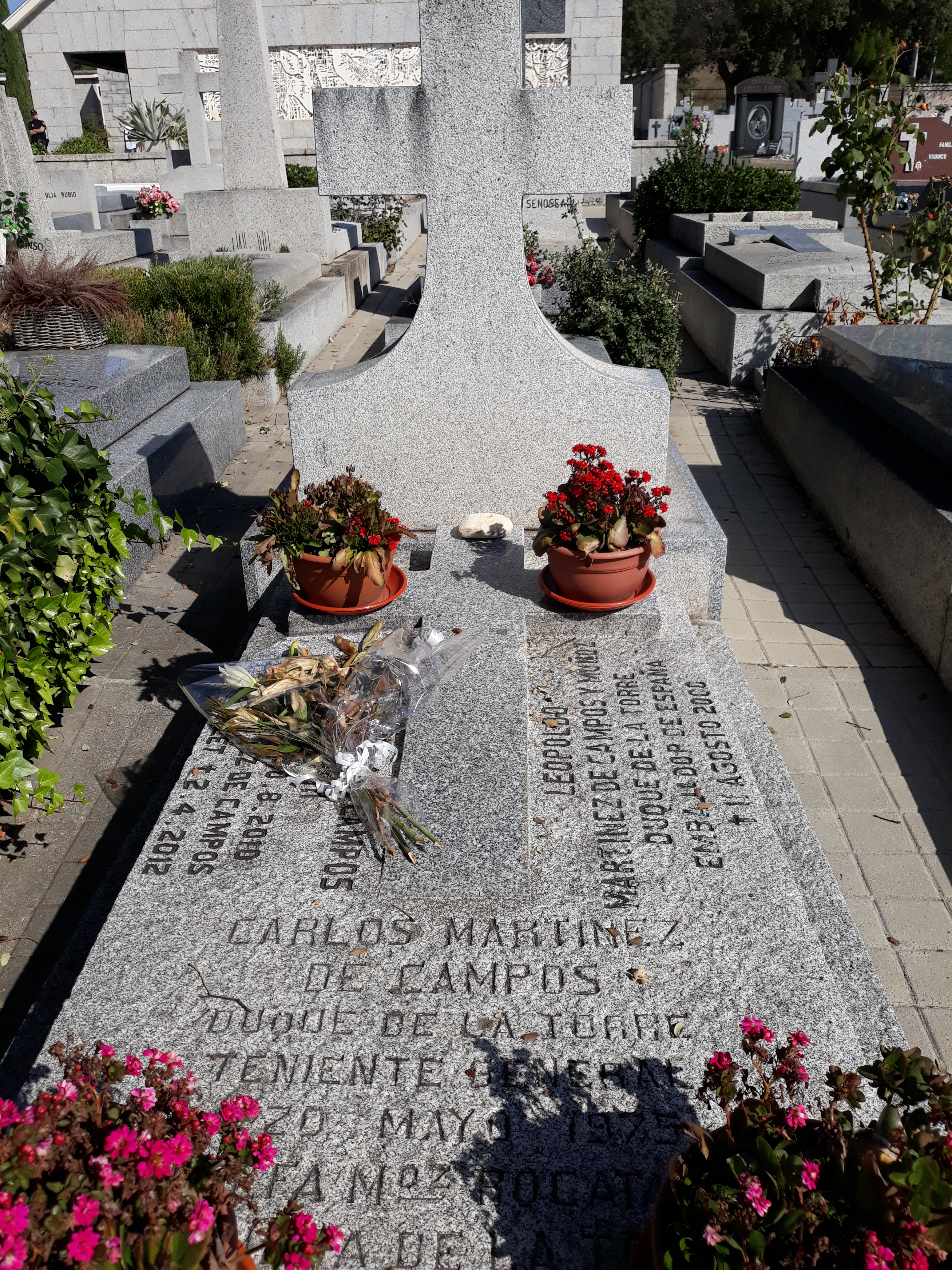 Das Grab des spanischen Historikers und Offiziers Carlos Martinez de Campos y Serrano auf dem Mingorrubio-Friedhof in Madrid-El Pardo.